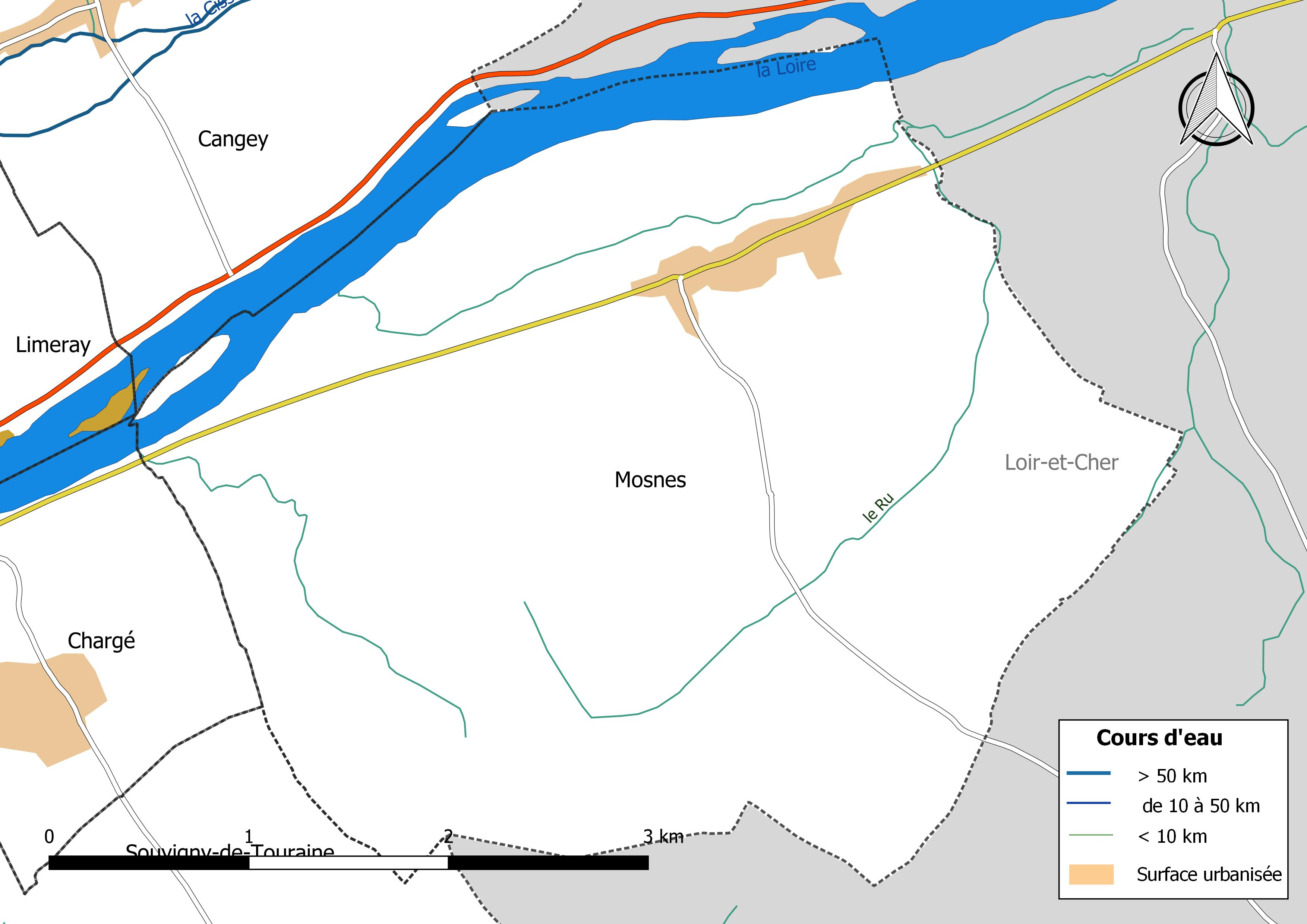 Carte du réseau hydrographique de la commune de Mosnes (France).